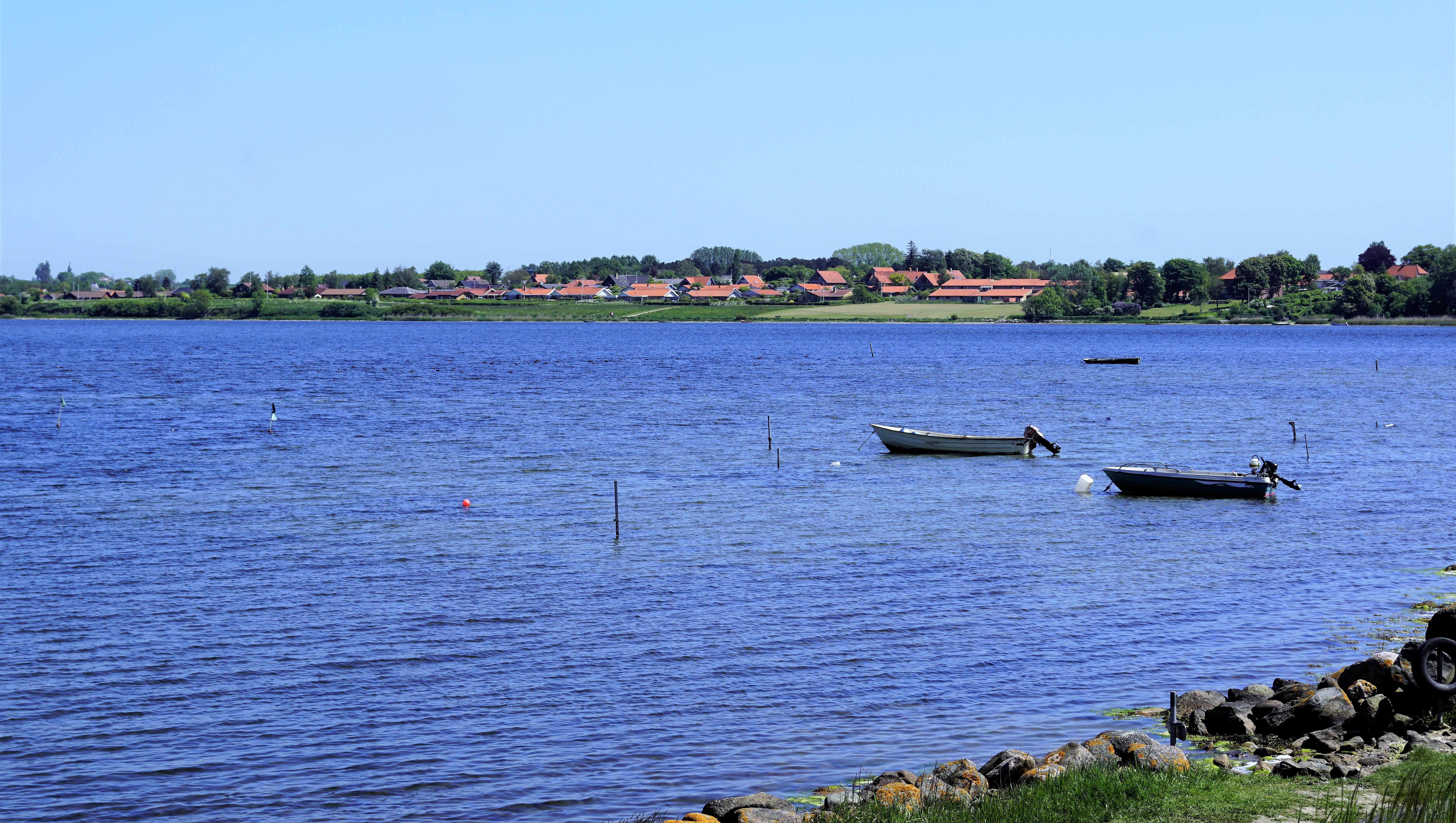 Skælskør Nor set mod nordøst